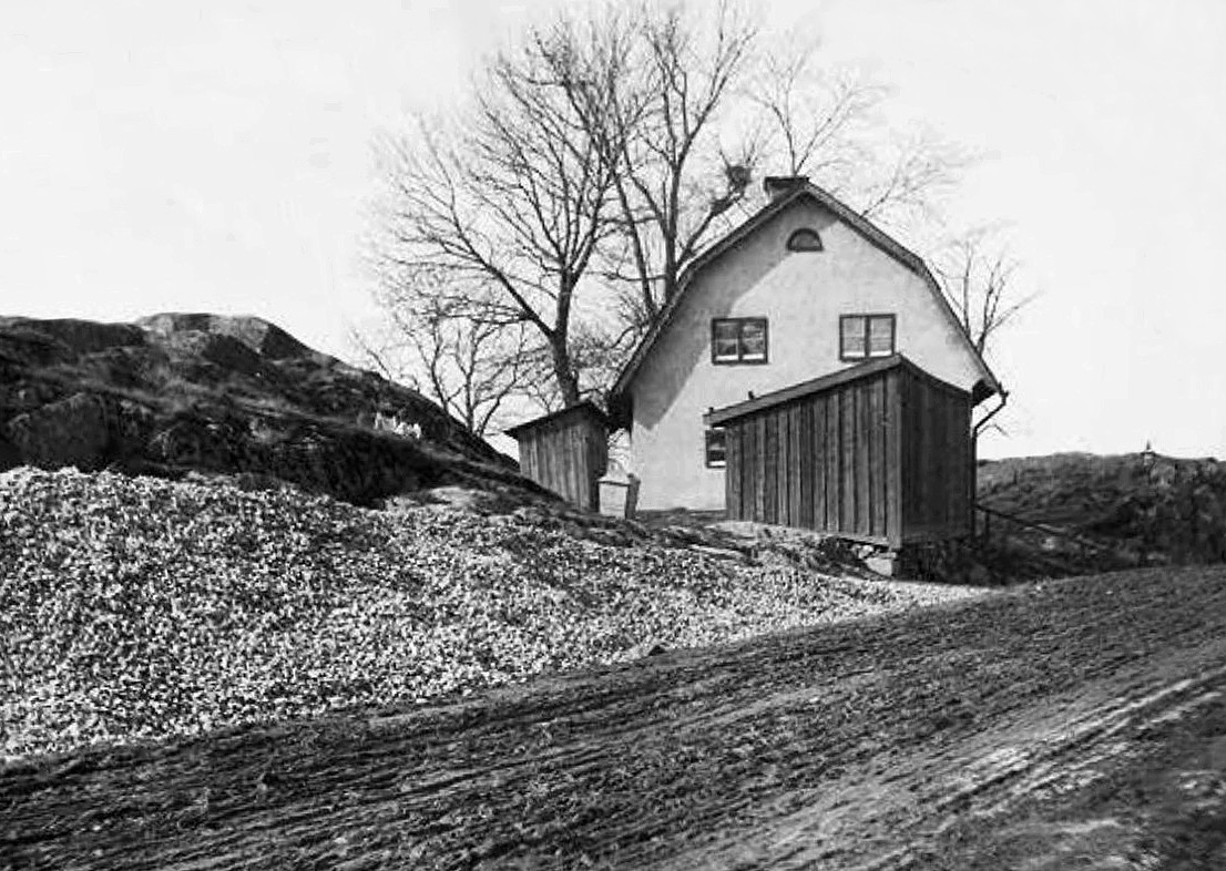 Grindvakten, Södermalm, ursprungligen tjänstebostad för portvakten vid malmgården Heleneborg.